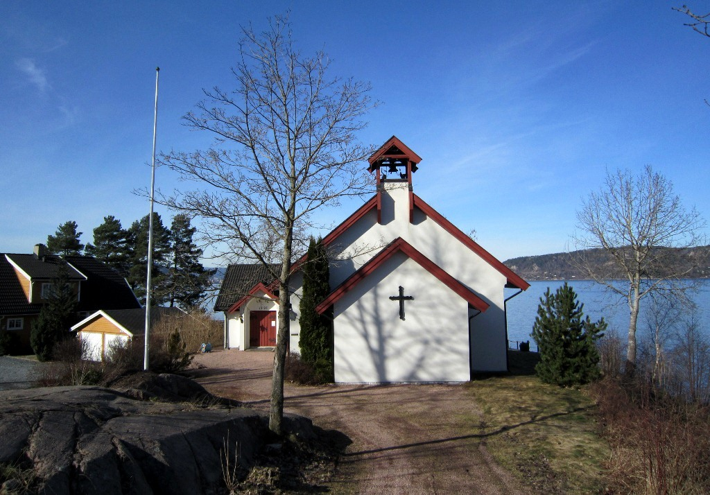 Nesbygda kirke (Svelvik kommune, Vestfold)